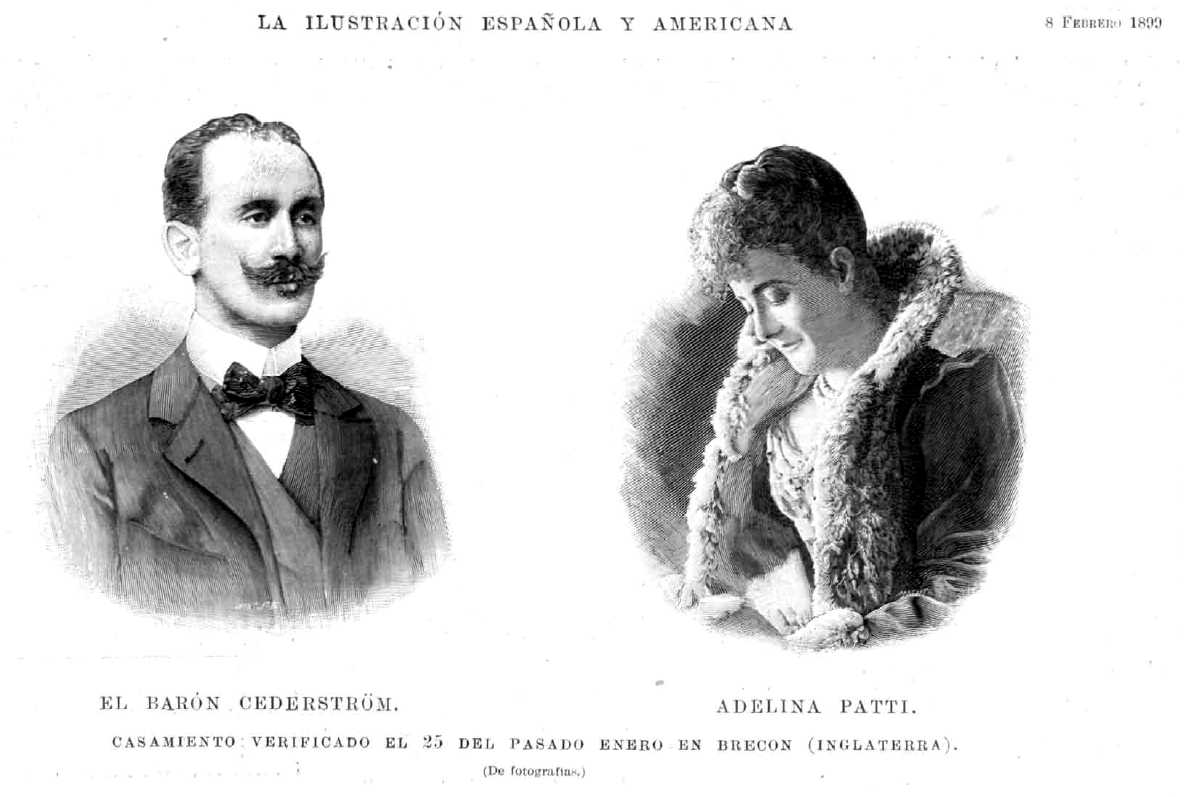 Adelina Patti y su tercero marido el baron Rolf Cederstrom casado el dia 25 de enero 1899 en Brecon, Inglaterra. Fotografia anonima publicada en La Ilustración española y americana 8.2.1899 pag. 84